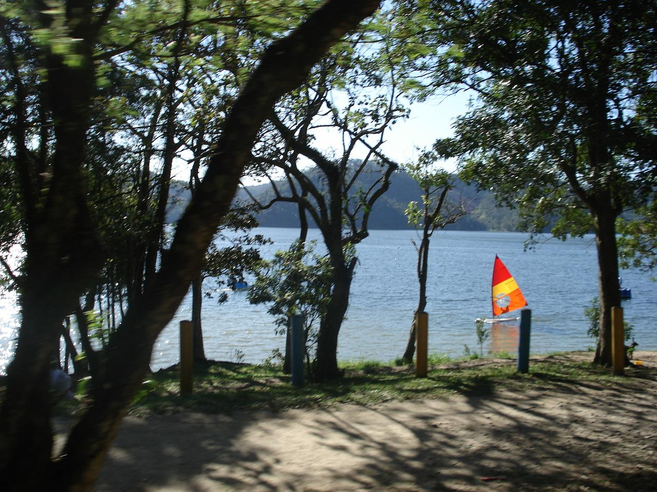 Passeio Parque Estoril - Sailing